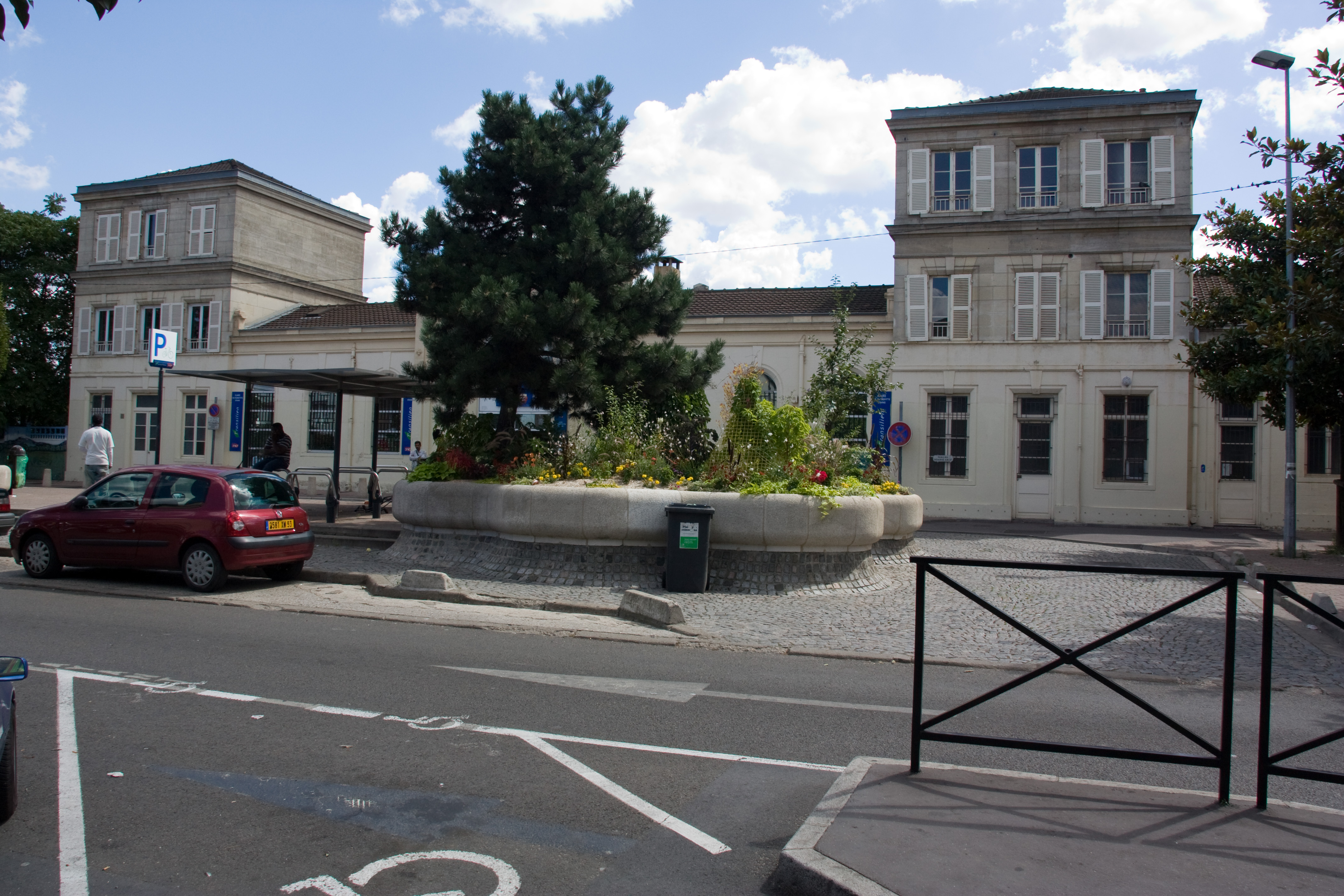 La Gare de Pierrefitte-Stains, département de Seine-Saint-Denis, France